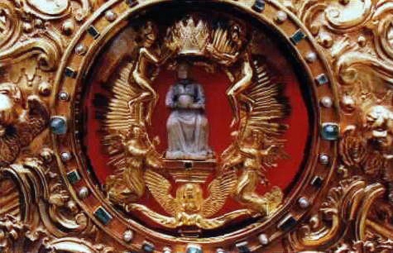 Detalle de la talla original encontrada en el siglo XVI de la Virgen de Orito